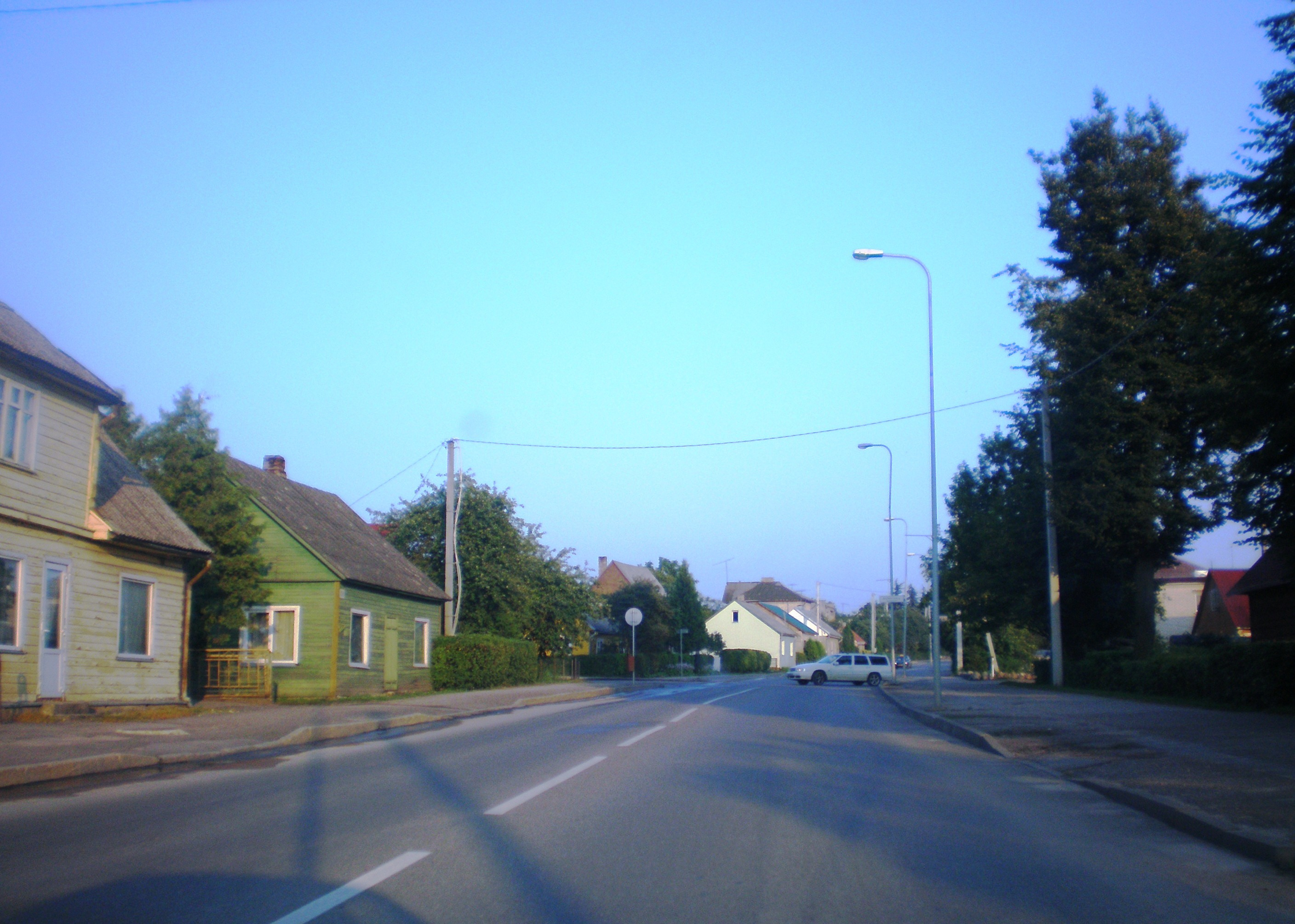 Raseiniai city